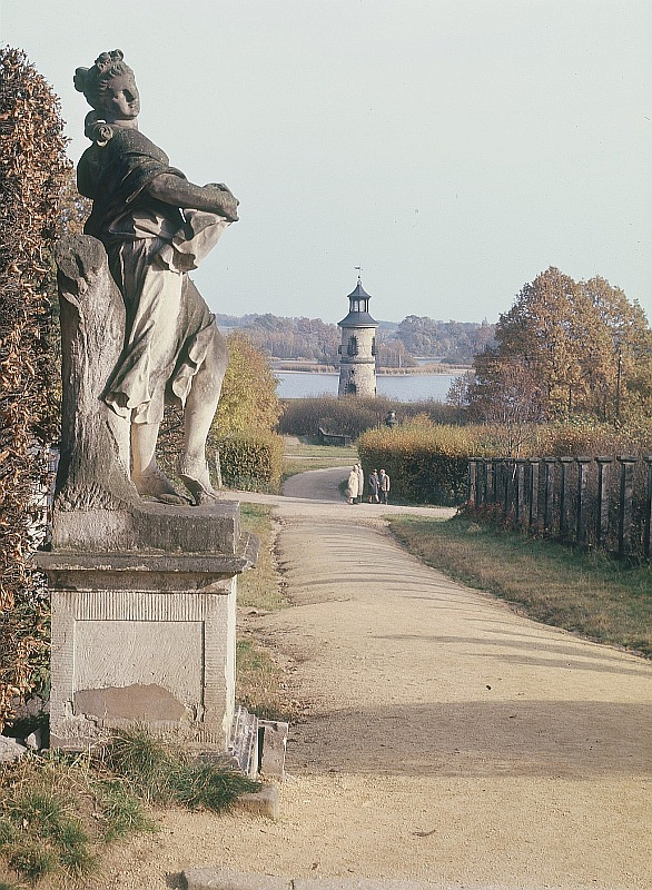 Original image description from the Deutsche Fotothek Moritzburg. Weibliche allegorische Figur am Fasanenschlößchen, mit Blick auf den Leuchtturm im Hintergrund